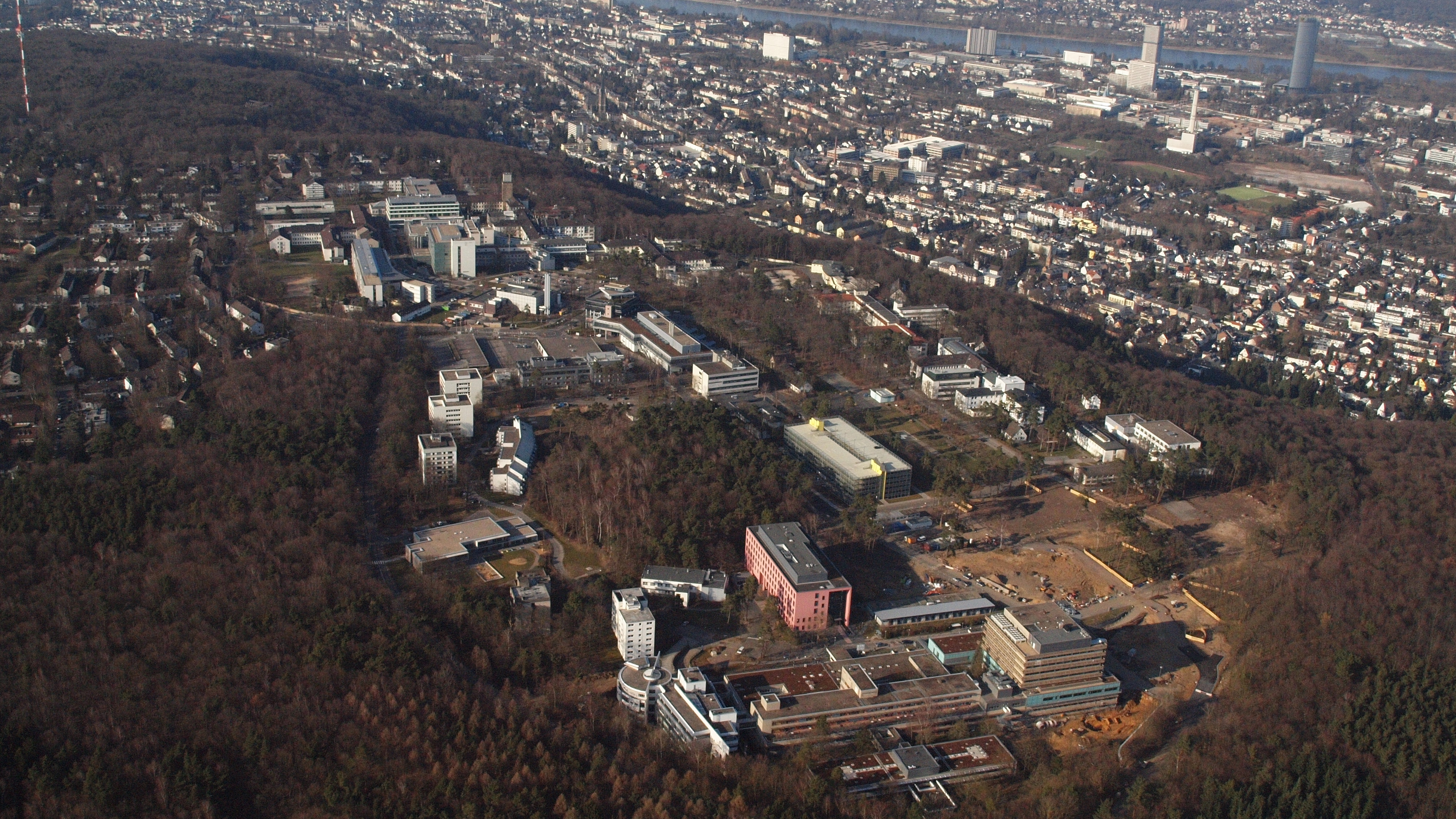 Venusberg, Universitätsklinikum Bonn: Gesamtansicht von Süden aus; rechts vorne Dottendorf, weiter links Kessenich